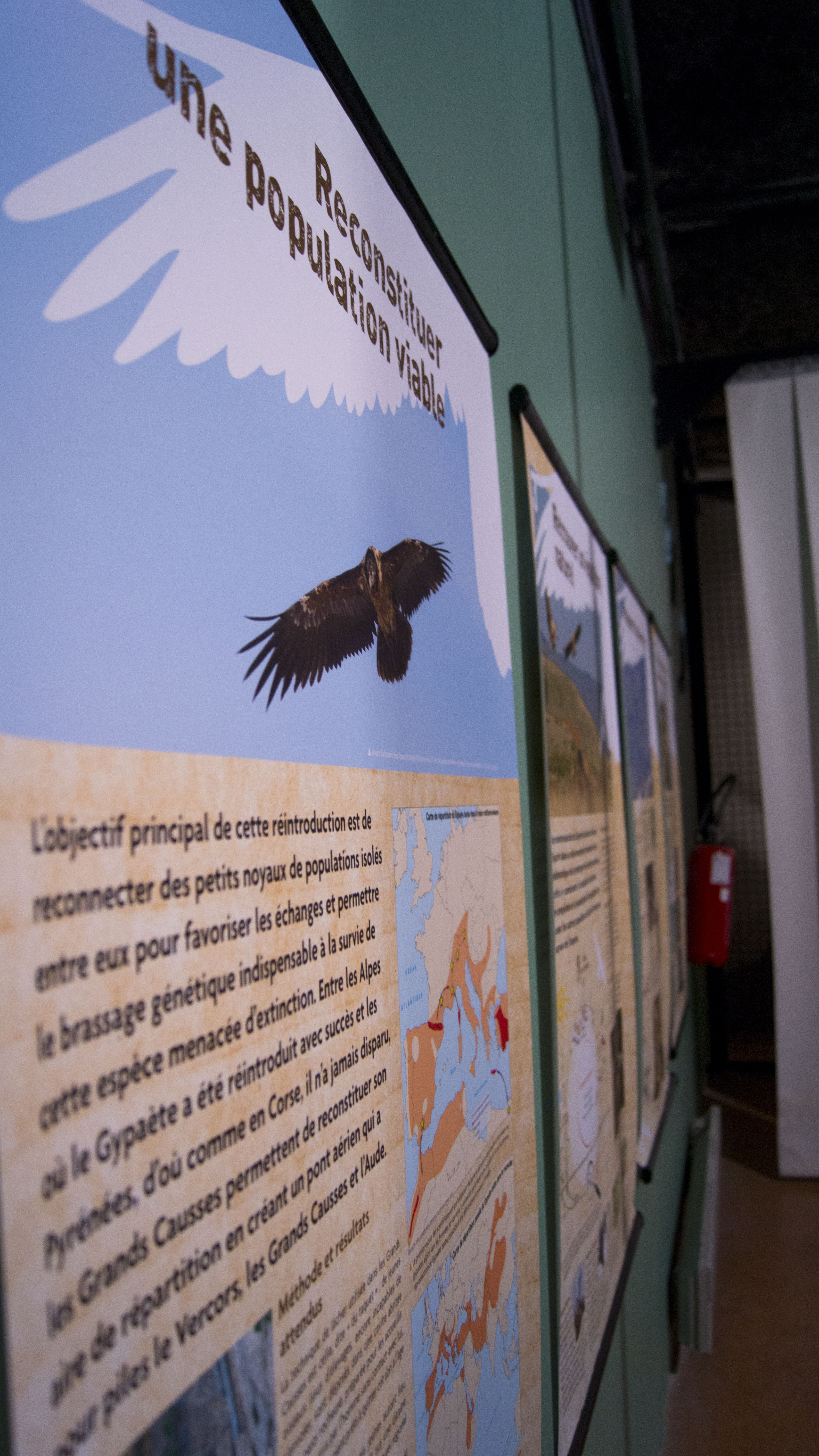 Panneau de la Maison des Vautours présentant le programme de réintroduction international.